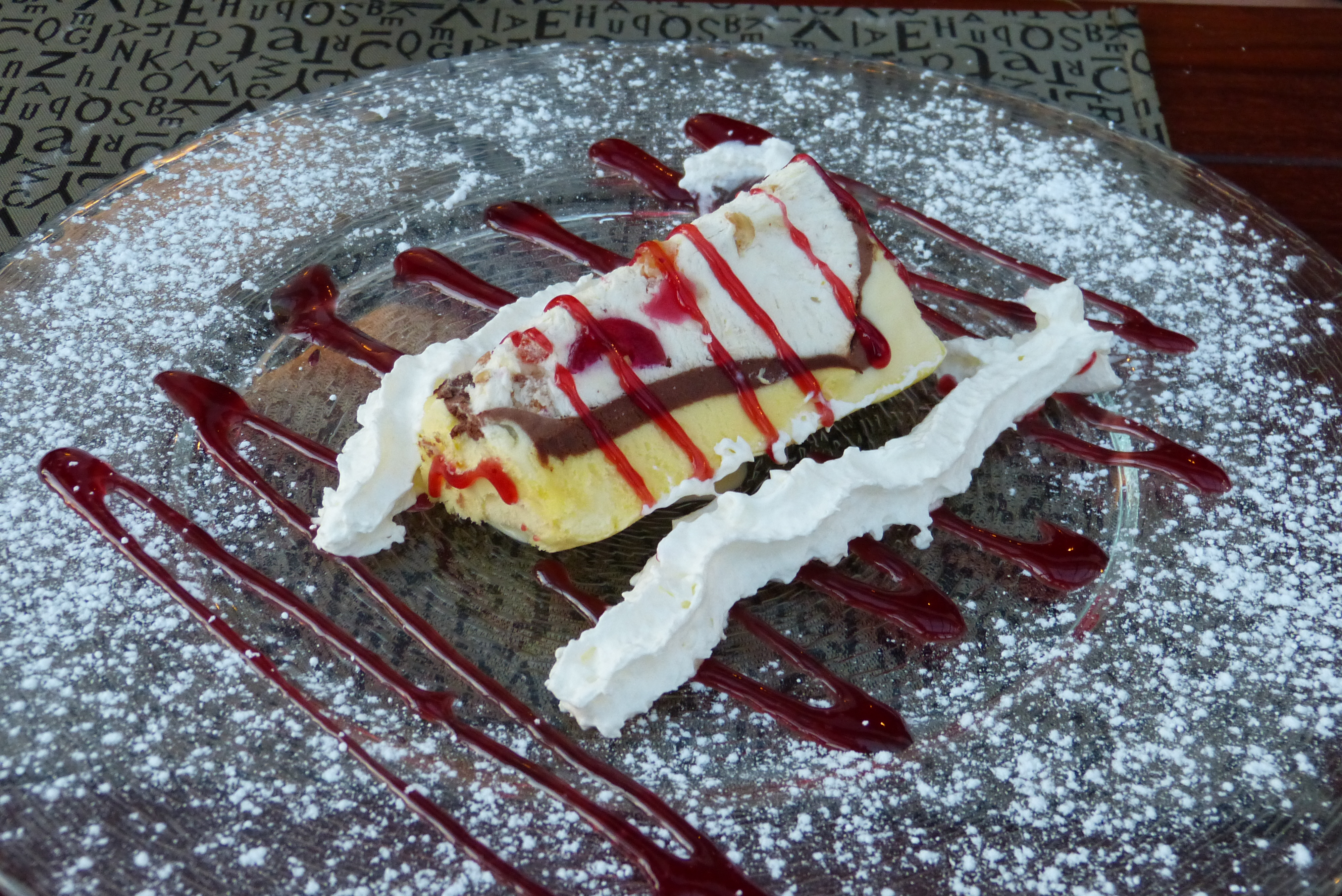 Stück einer Cassata-Eisbombe im Ristorante Da Luciano, Augsburg.